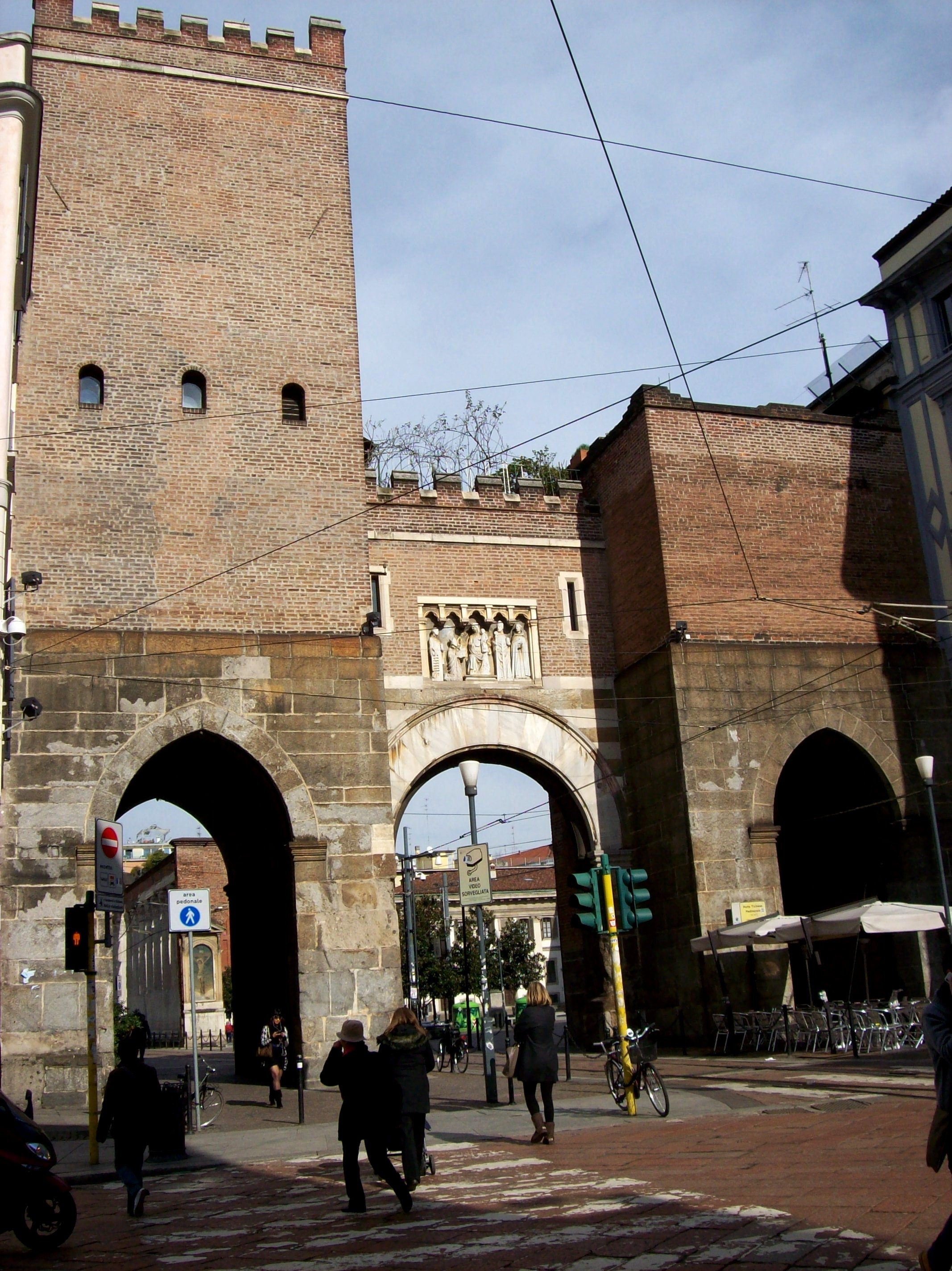 Il lato esterno della porta Ticinese medievale, vista dalla cerchia delle Mura